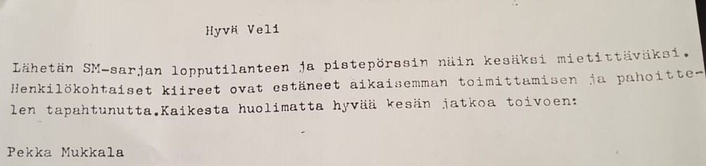 Pekka Mukkalan kirje salibandyn SM-sarjaseuroille kesällä 1987